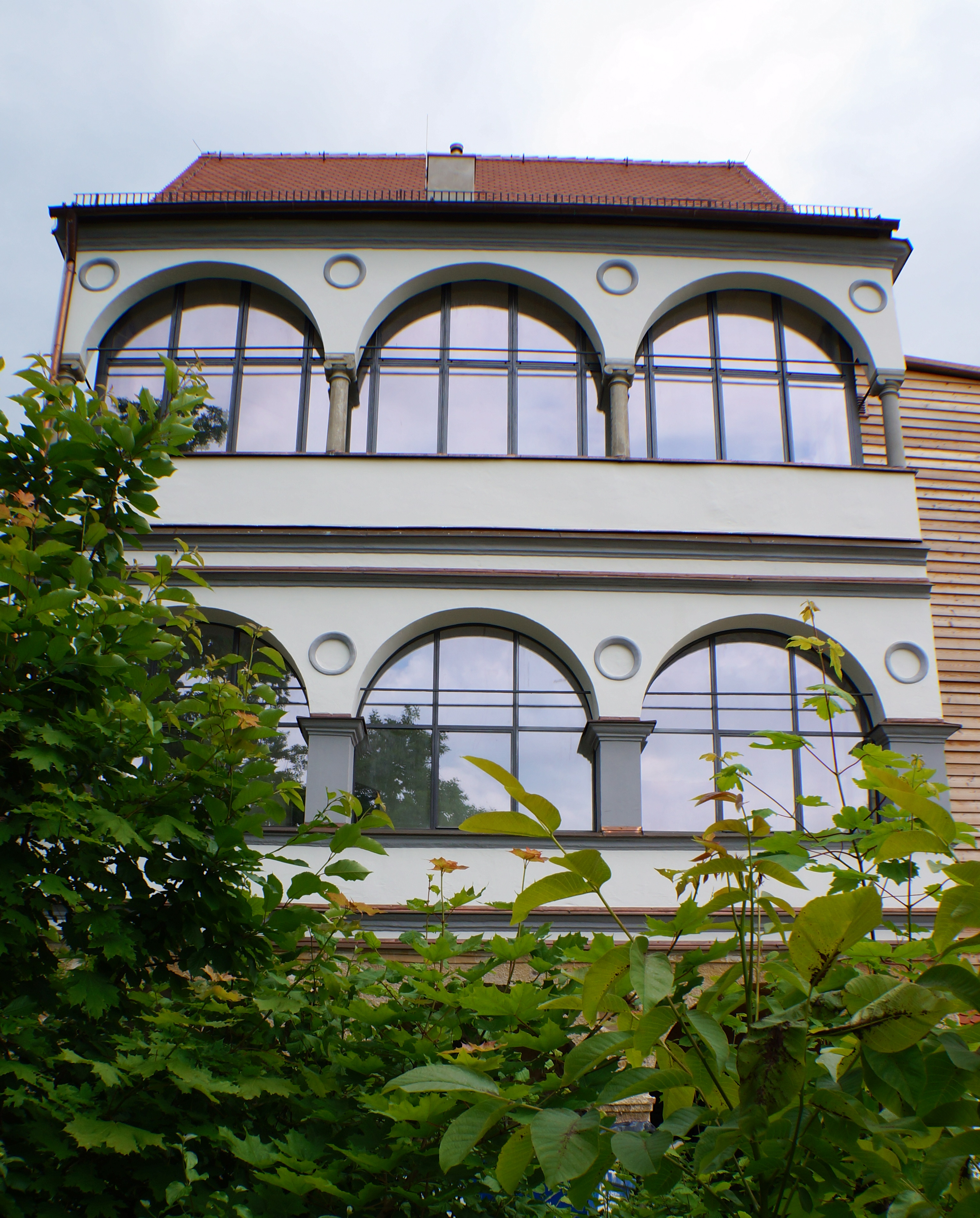 Die Arkadenseite des Fugger-und-Welser-Erlebnismuseums in Augsburg von Norden nach der Renovierung. This is a photograph of an architectural monument.